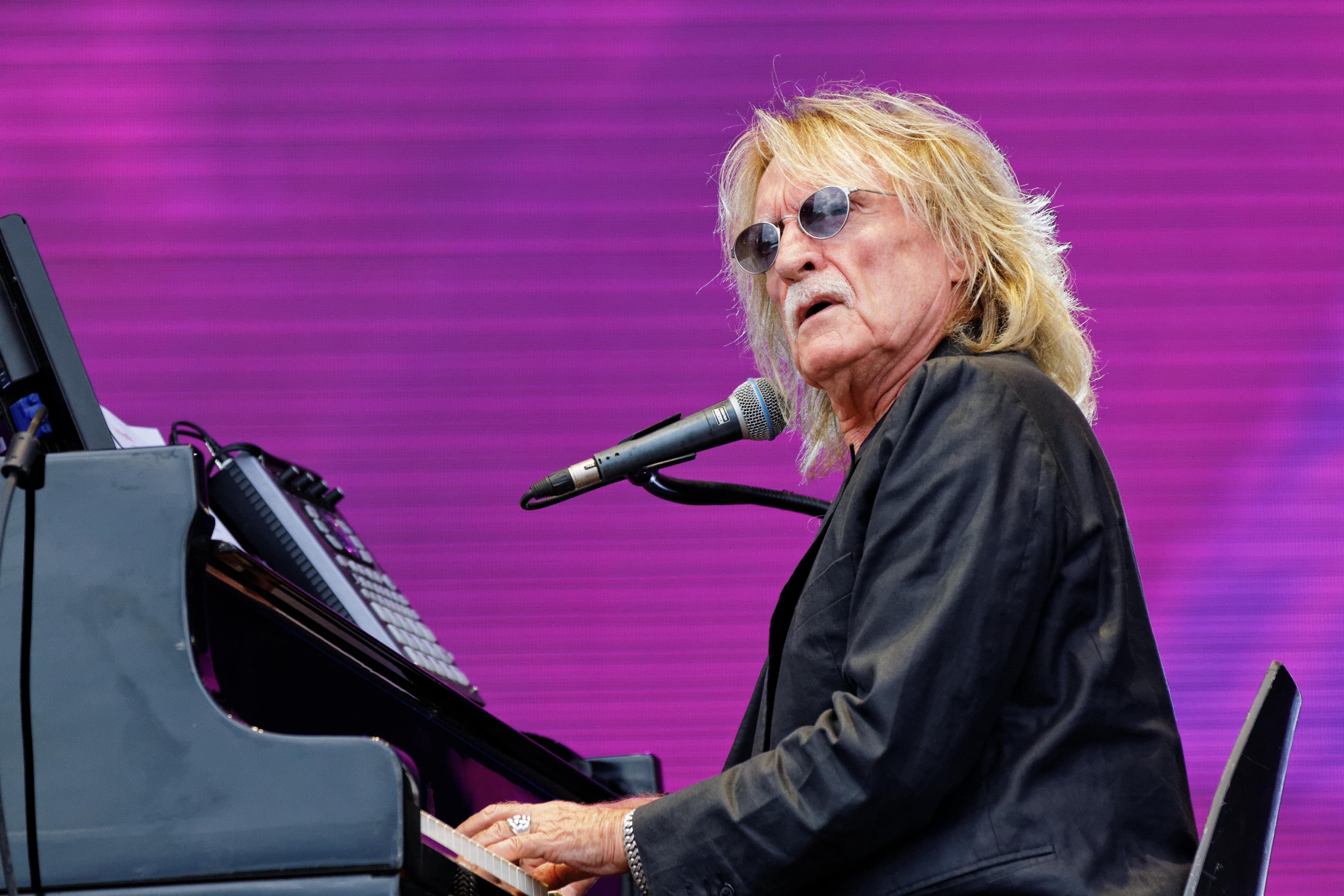 Christophe en concert sur la scène Glenmor lors du festival des Vieilles Charrues 2014.